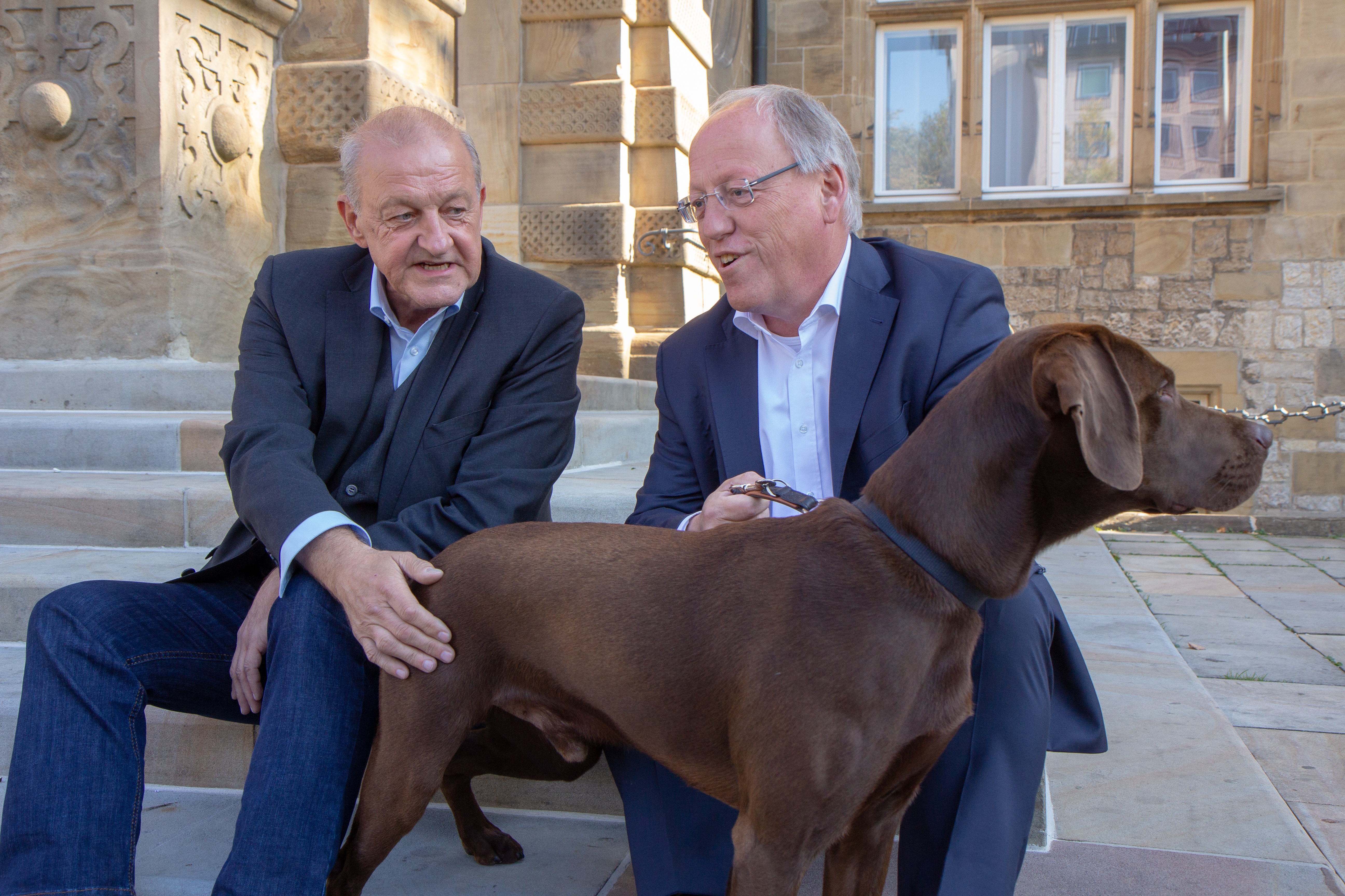 Pressetermin am Set "Wilsberg" am Alten Rathaus in Bielefeld am 15. Oktober 2018. Gruppe:Leonhard Landsink, Hund Scotty, Pit Clausen